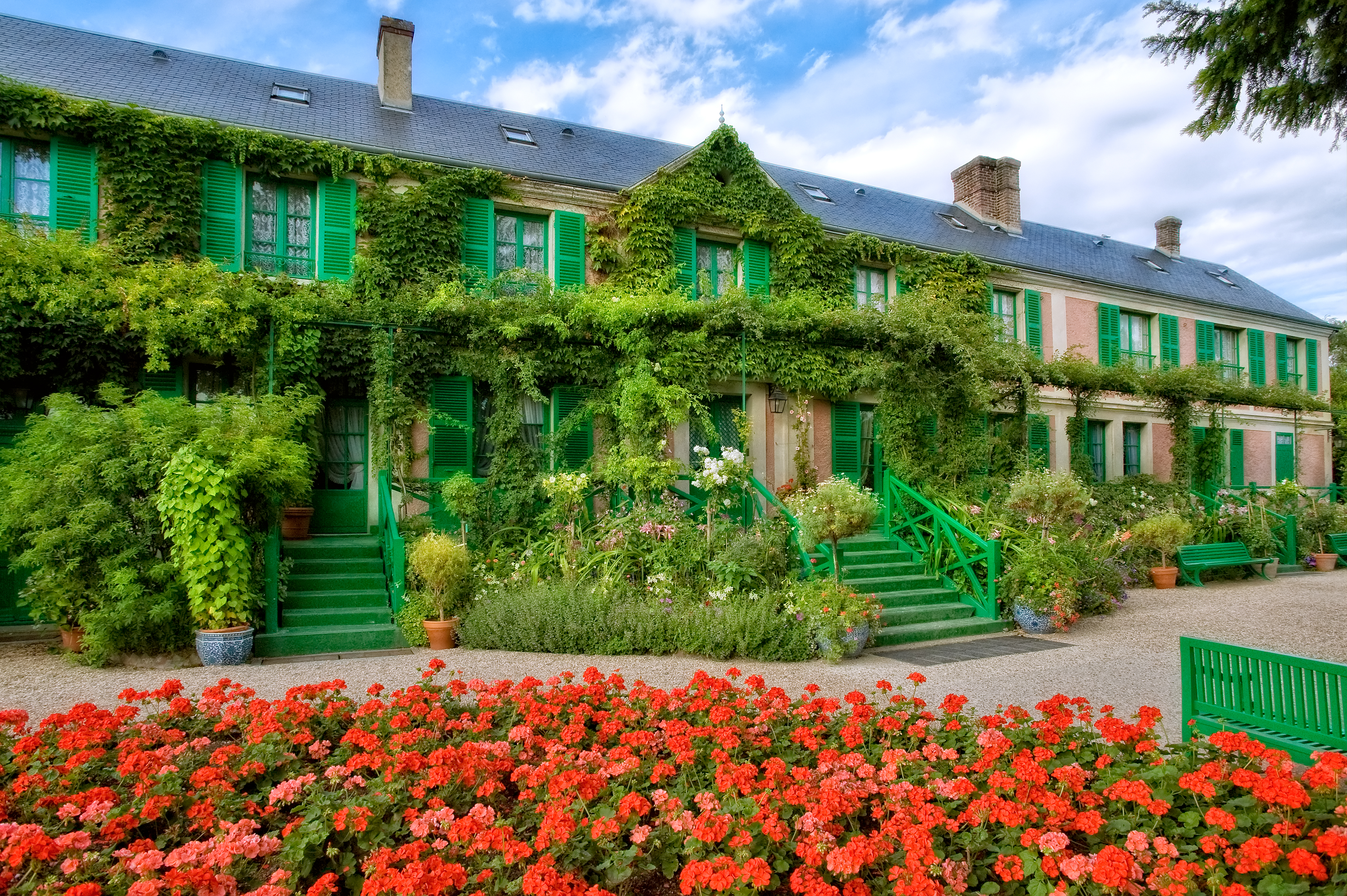 La Maison vue du Clos Normand